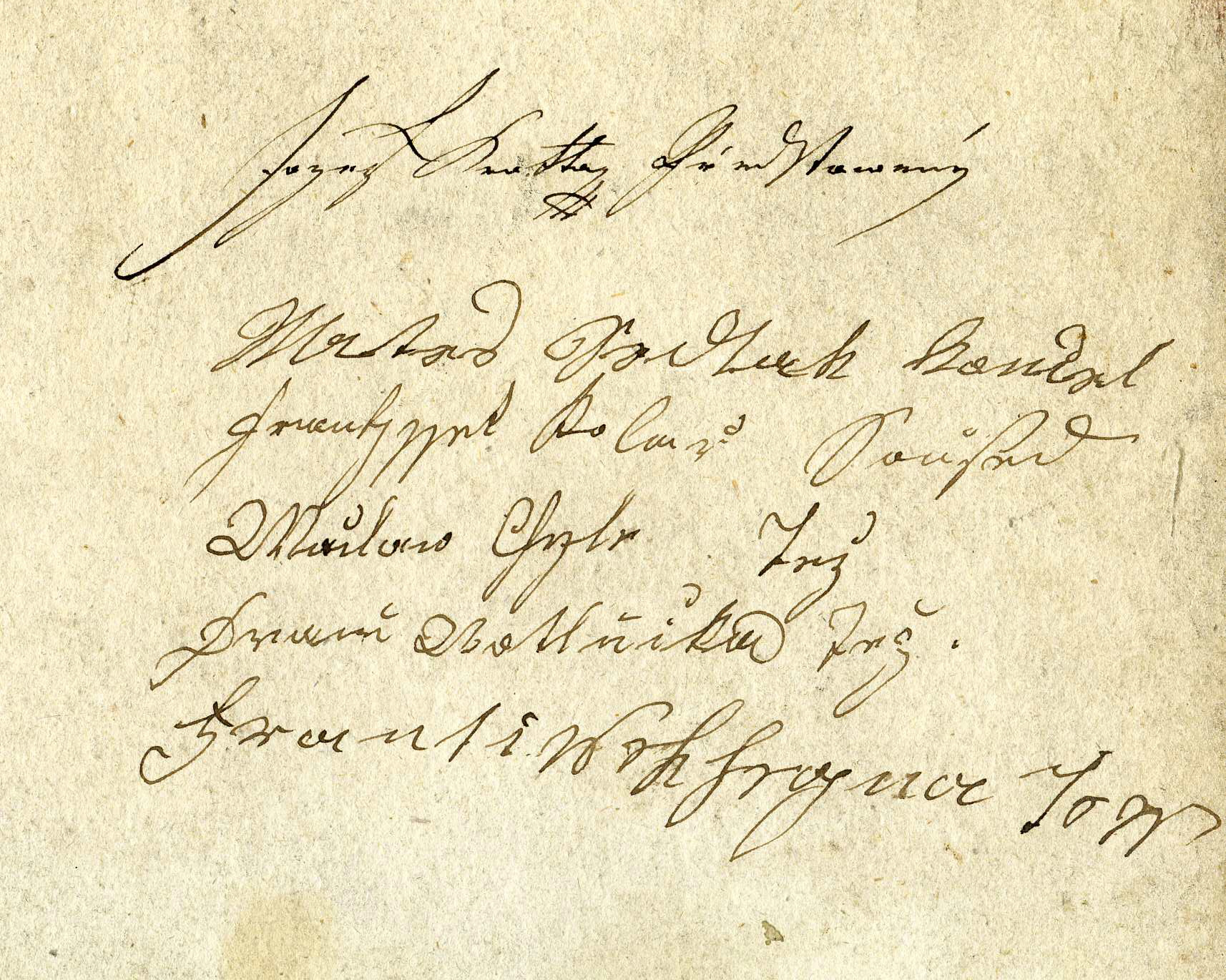 Podpisy sousedů z Bražné 1839 na indikační skice